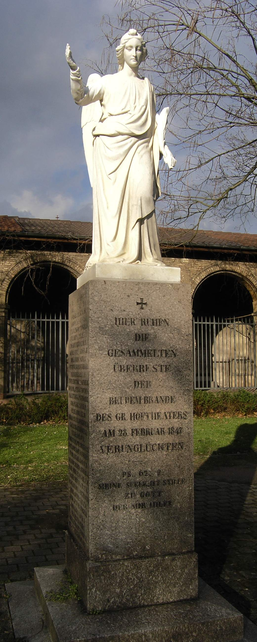 Denkmal für den Brand im Badischen Hoftheater 1847-02-28